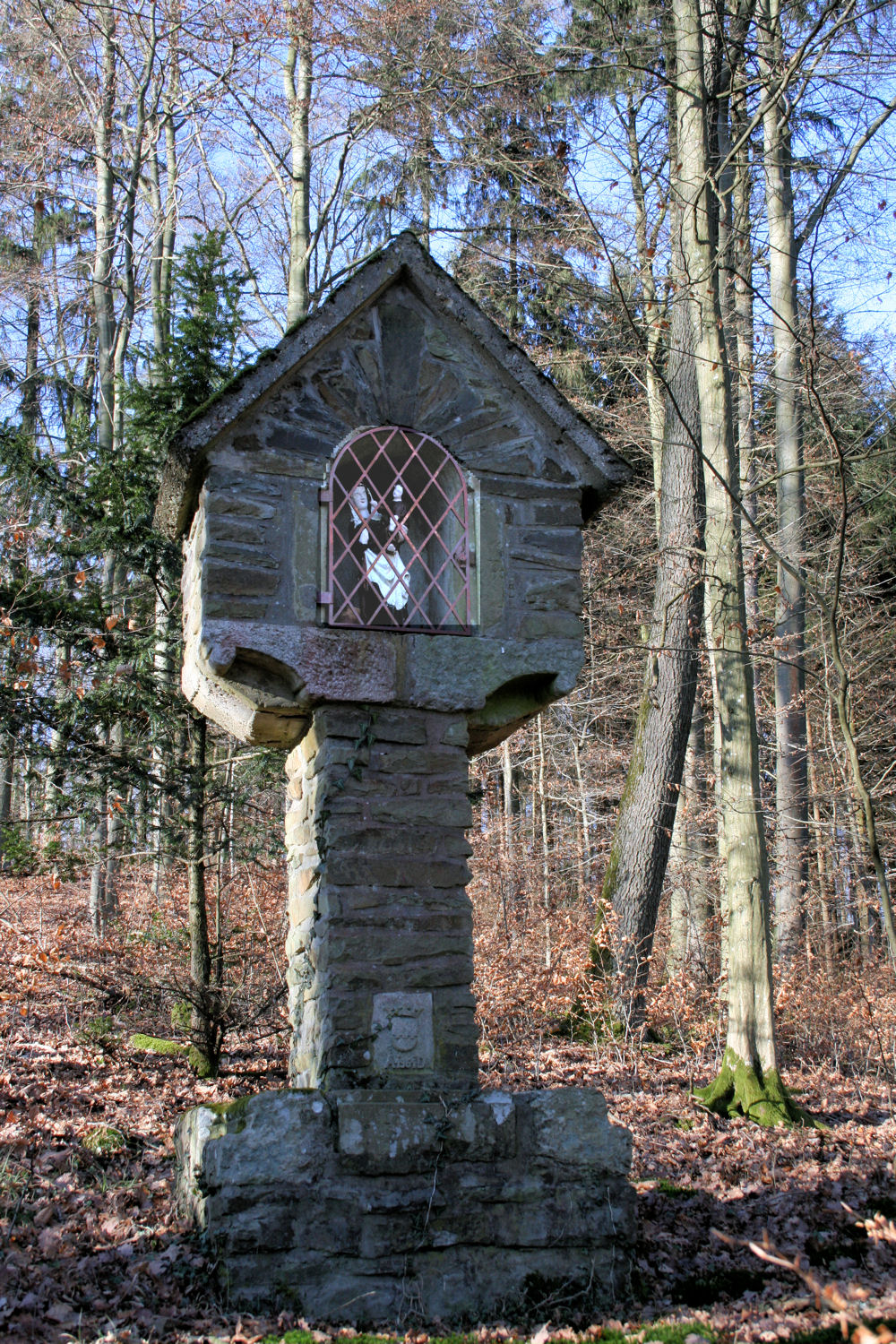 Bildstock Thielenbach